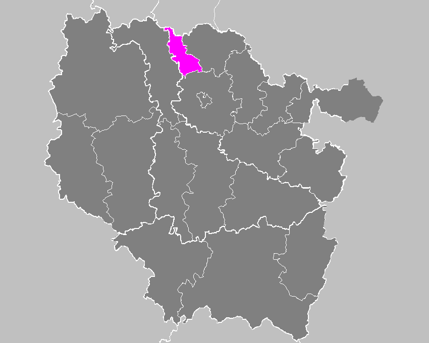 Maps of arrondissements and cantons of France: Arrondissement de Thionville-Ouest.PNG